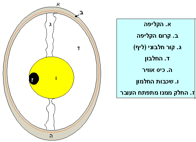 שרטוט סכמתי של מבנה ביצה